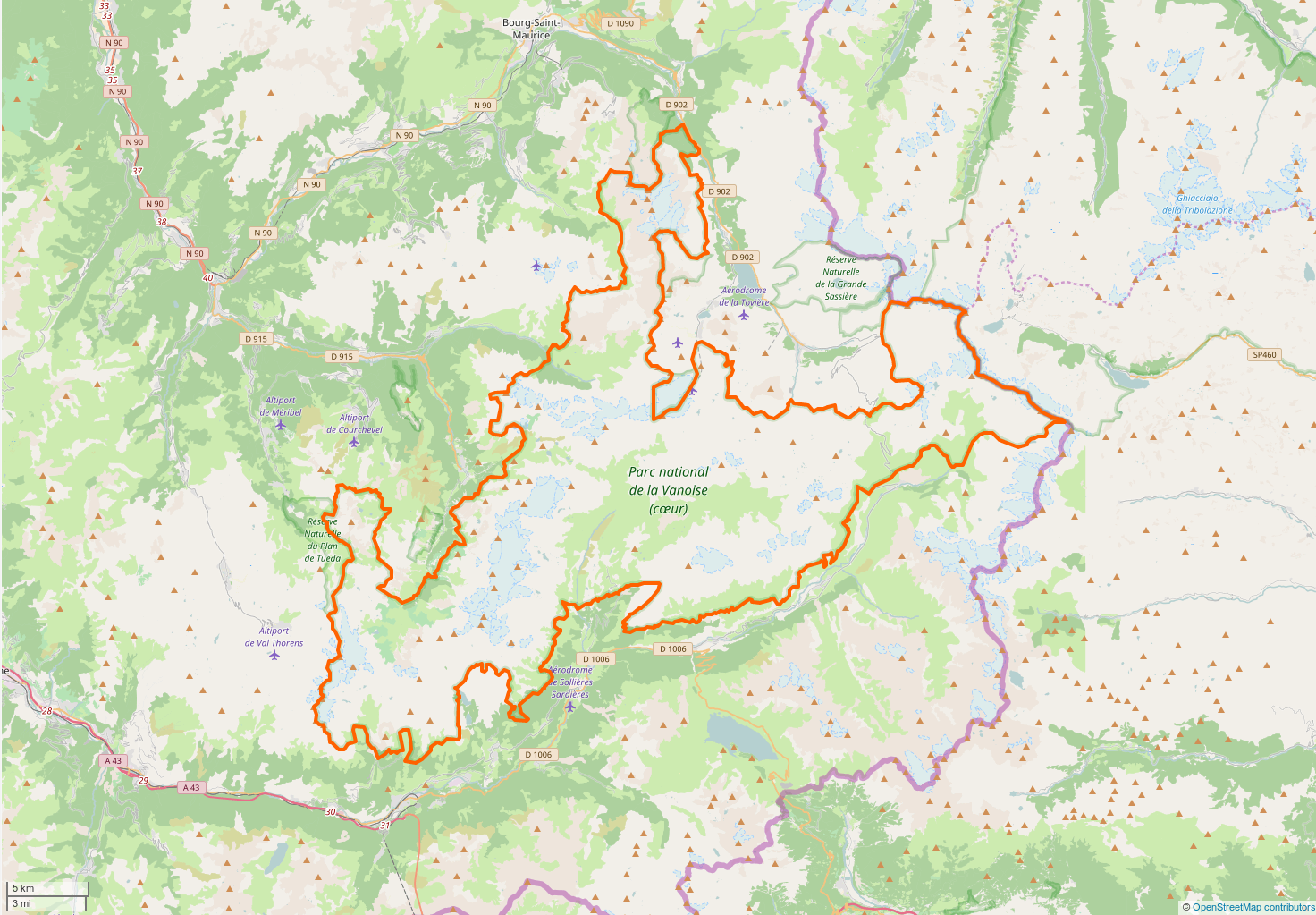 Périmètre du coeur de parc du Parc national de la Vanoise.